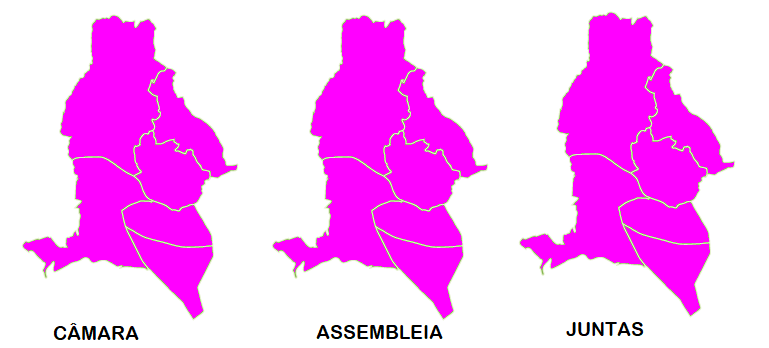 Mapa ilustrativo do partido mais votado por Freguesia na Amadora (2017)